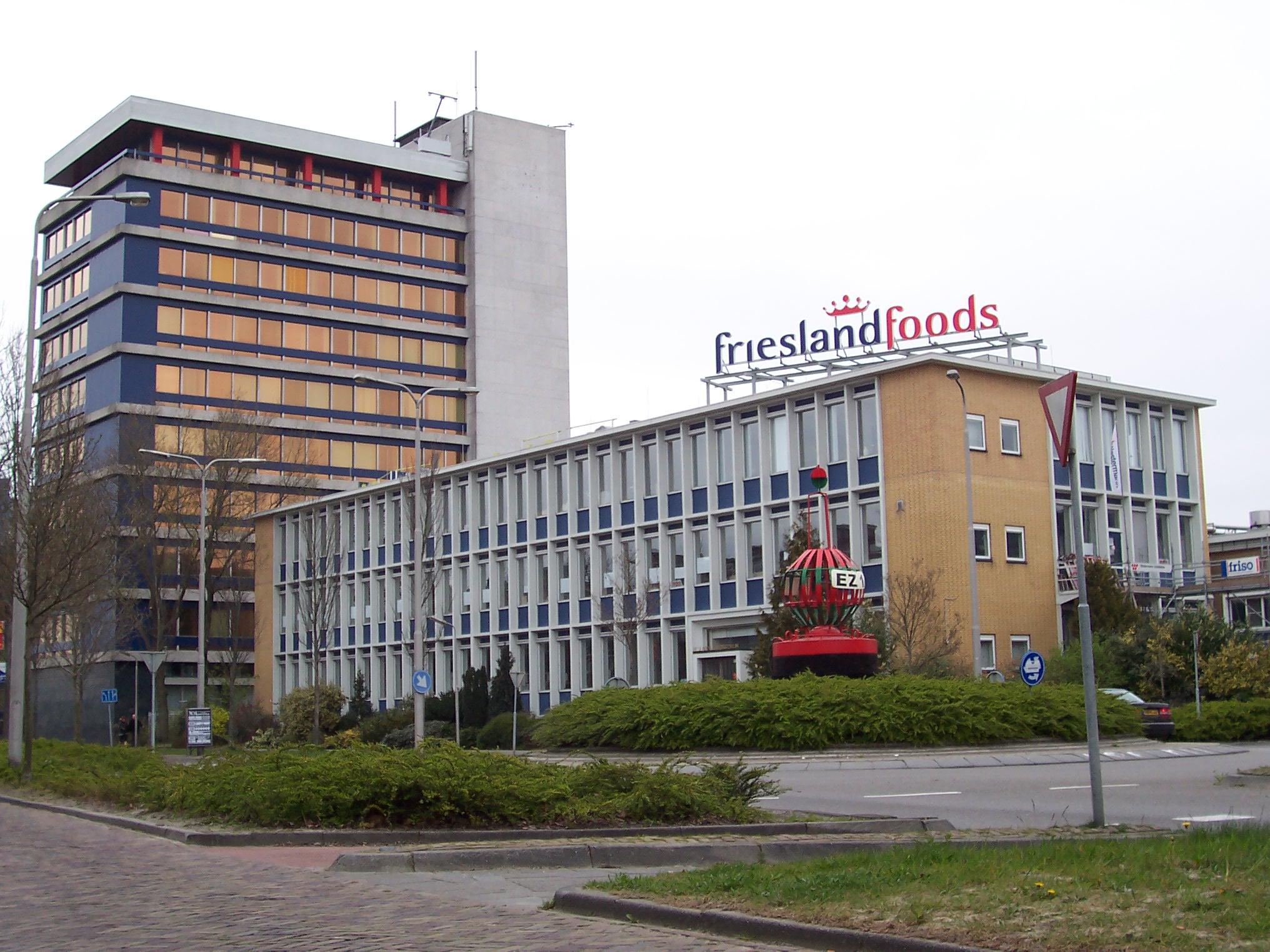 Kantoor en laboratorium van Friesland Foods in Leeuwarden